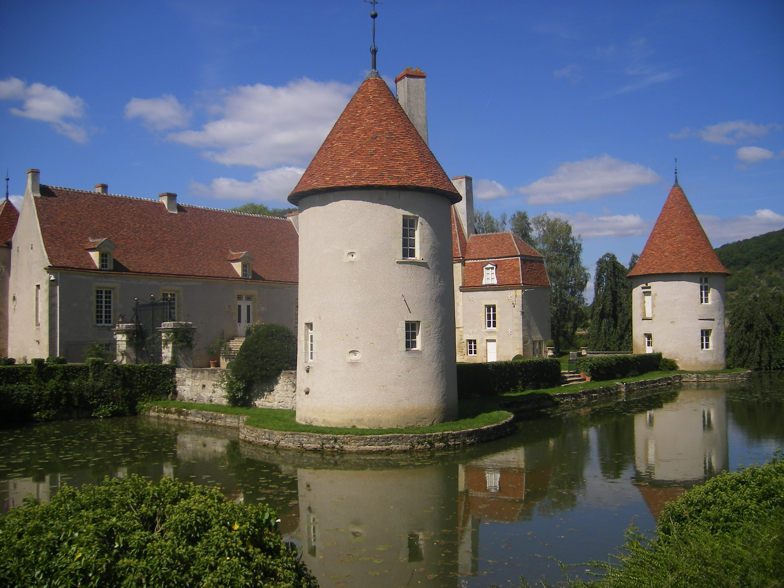 Brinon-sur-Beuvron castle